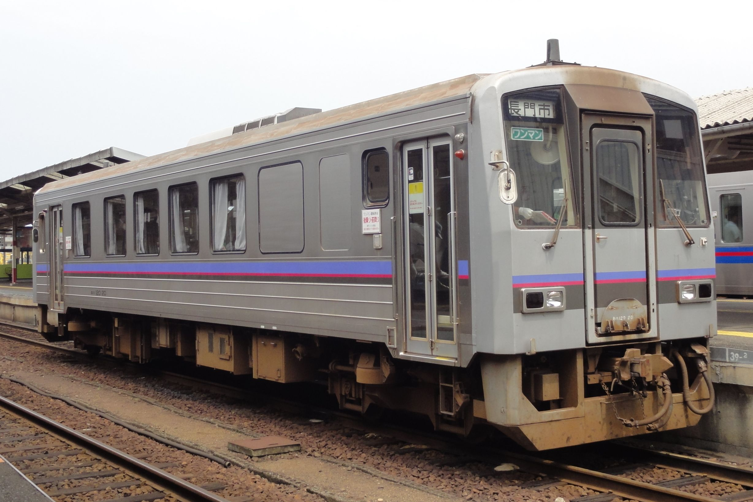 キハ120形気動車